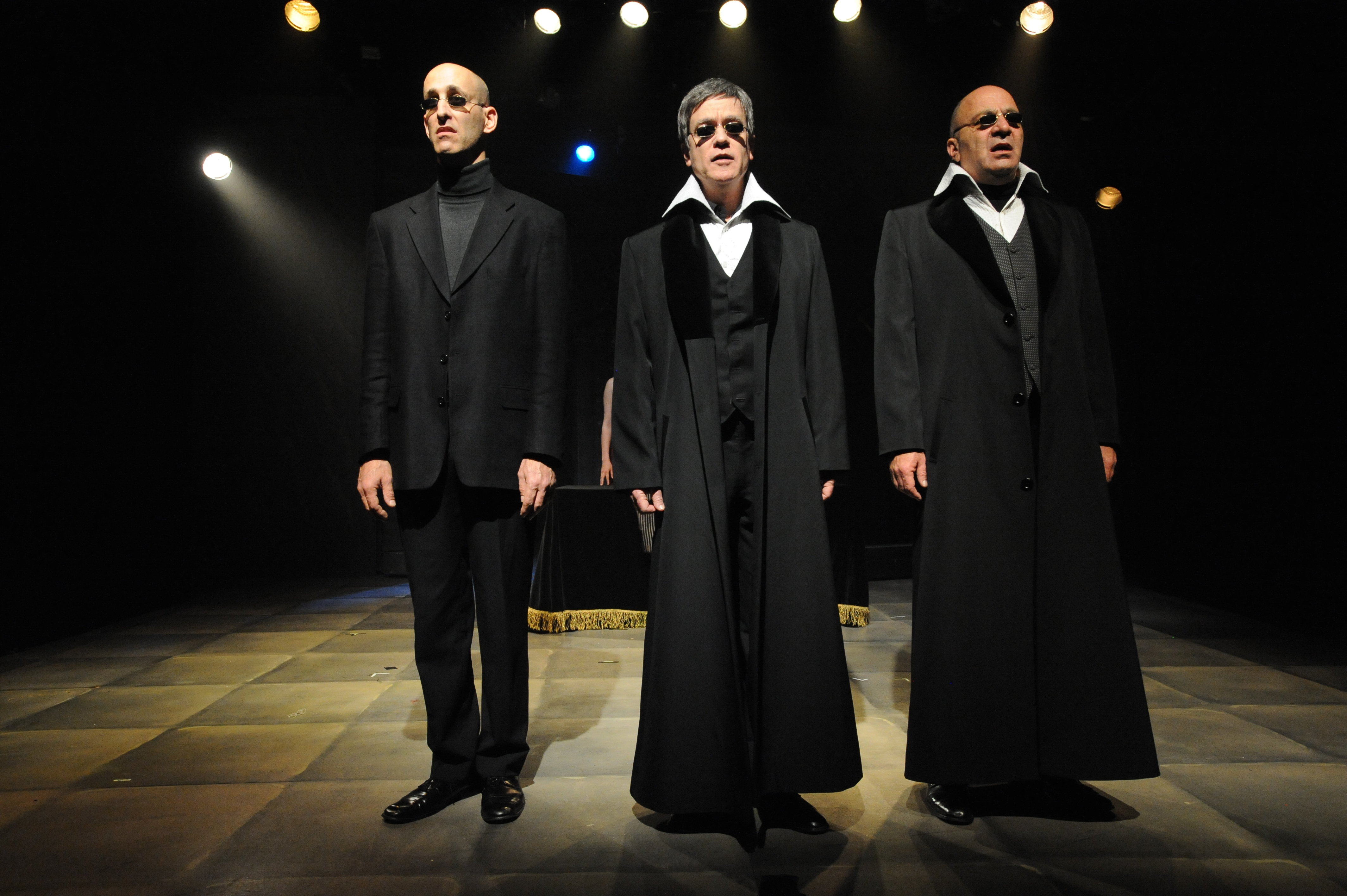 שלושת הדרקונים (אריה צ'רנר, יהויכין פרידלנדר וניר רון) בהצגה "אהובת הדרקון", מאת ובבימויו של מיקי גורביץ',תיאטרון החאן